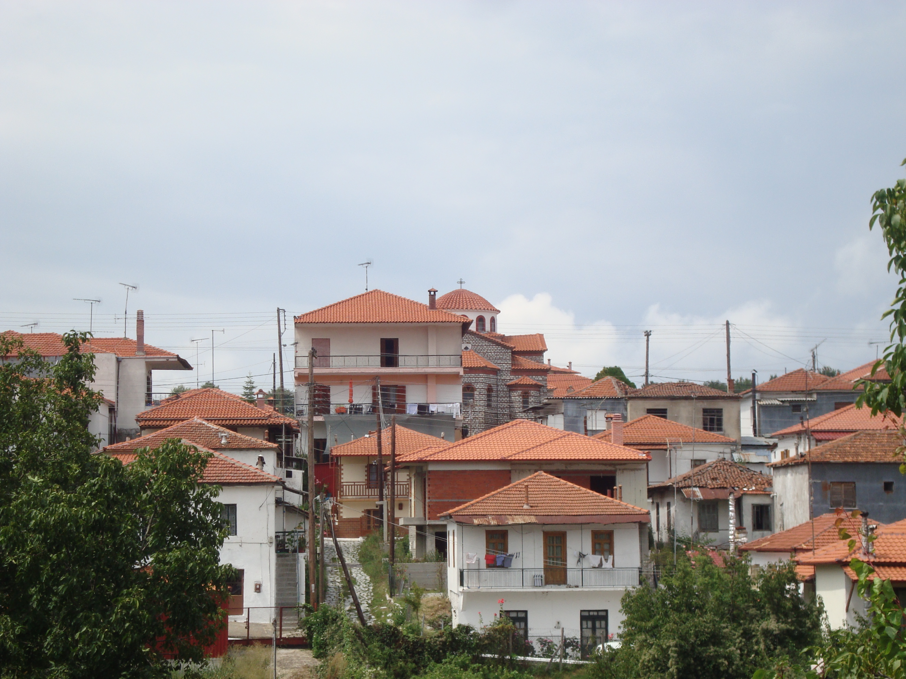 Изглед към село Варвара, Ном Халкидики, Гърция.